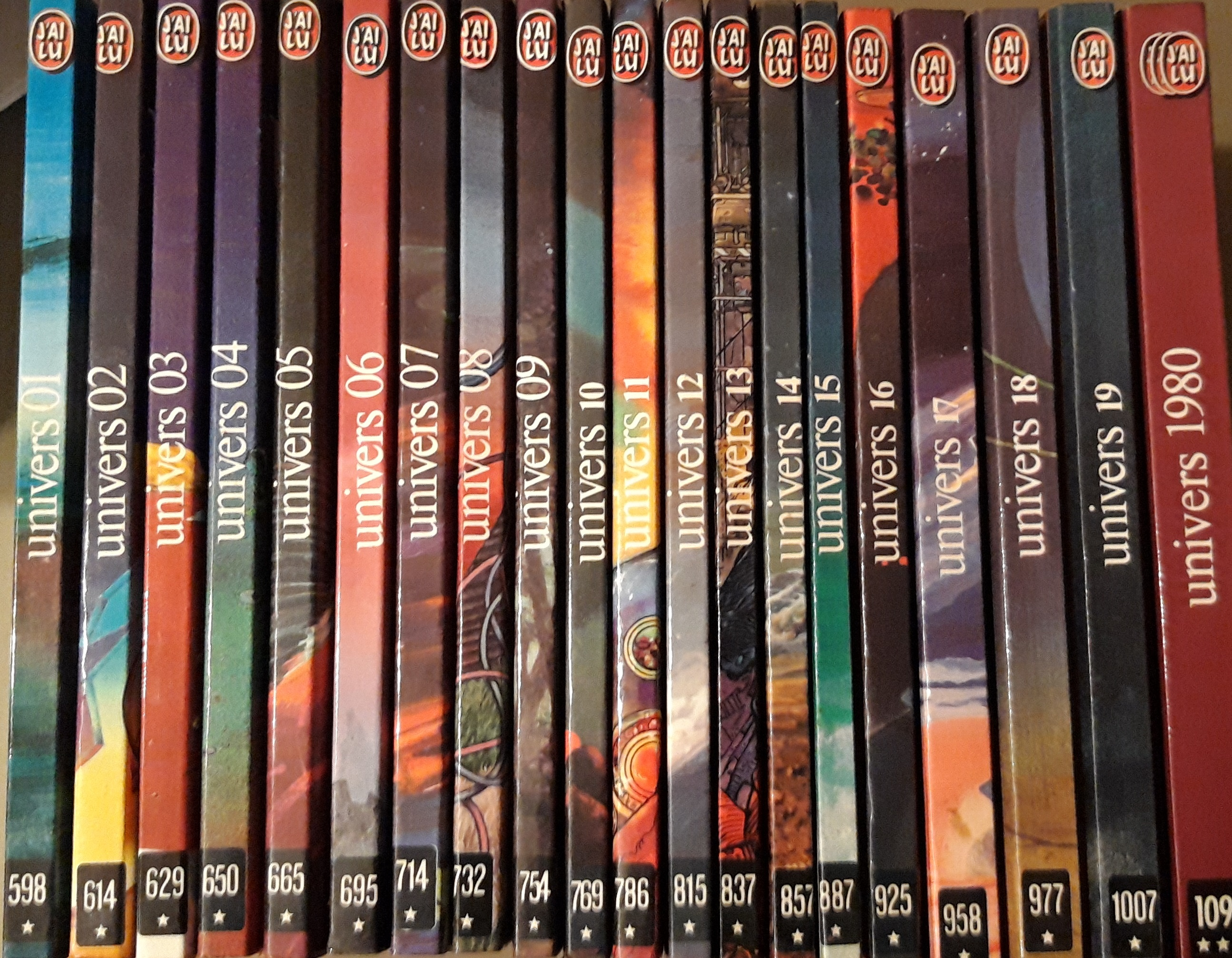 Anthologies françaises 'Univers' J'Ai Lu.